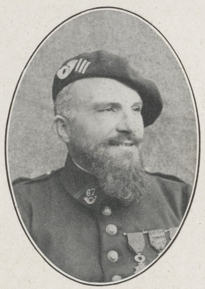 Le Chef de Bataillon BALLON Commandant le 3e Bataillon (1918) [ici capitaine du 67e BCA].